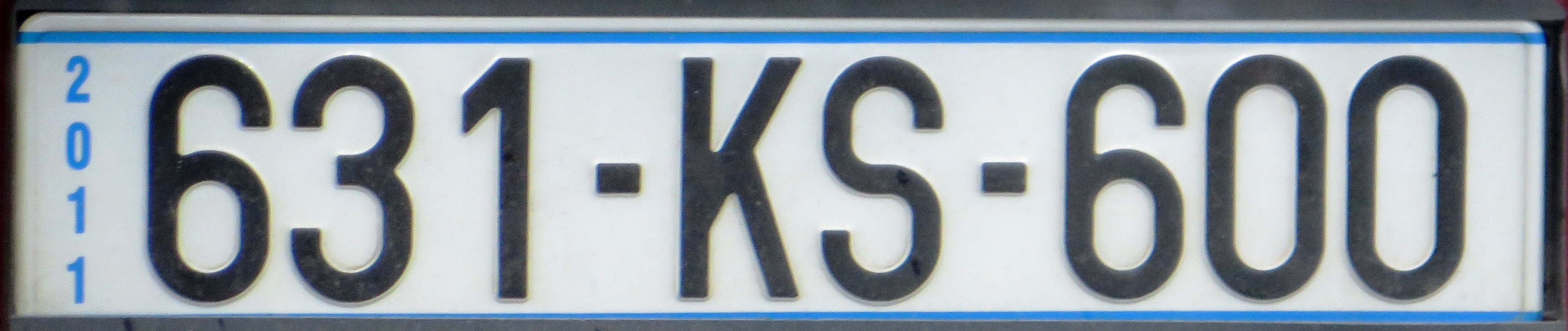 Kosovo Bus kentekenplaat